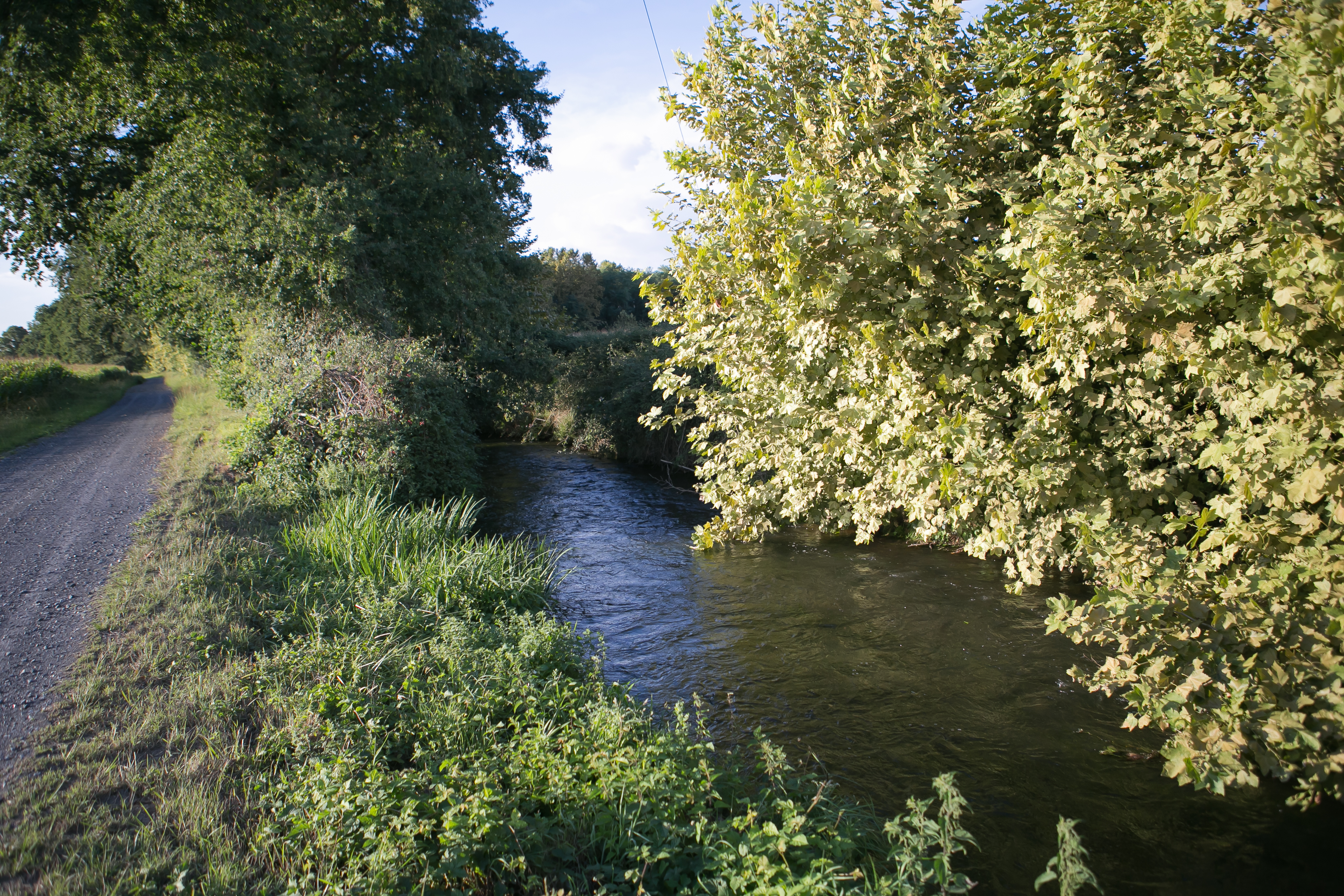 Vue du canal du moulin de Sombrun à Sombrun (à la limite Nord-Est du territoire de Sombrun) / Hautes-Pyrénnées / France